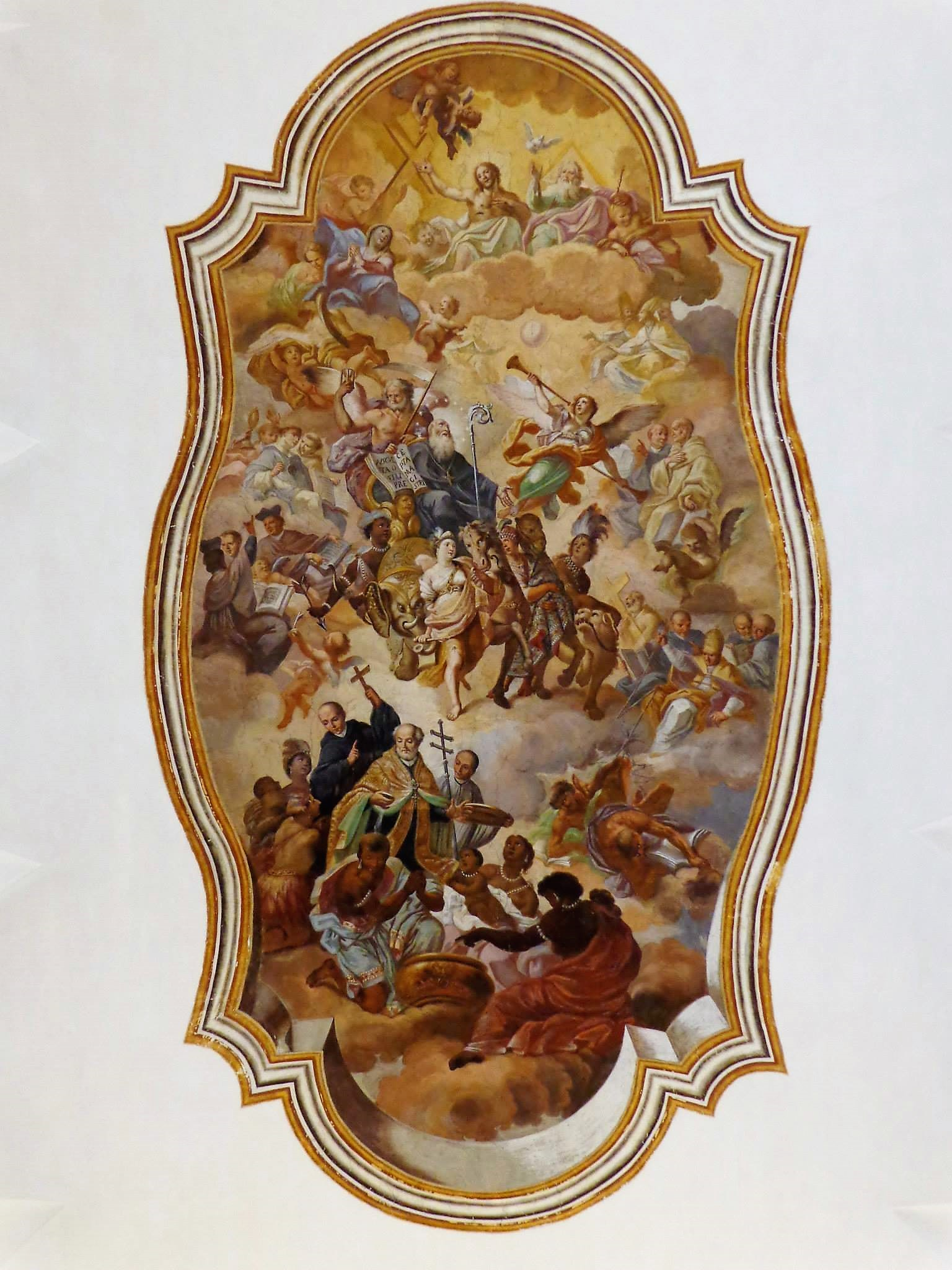 Affresco monastero